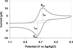 Cyclovoltammogram